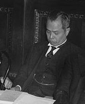 Senate President Camilo Osias in 1939